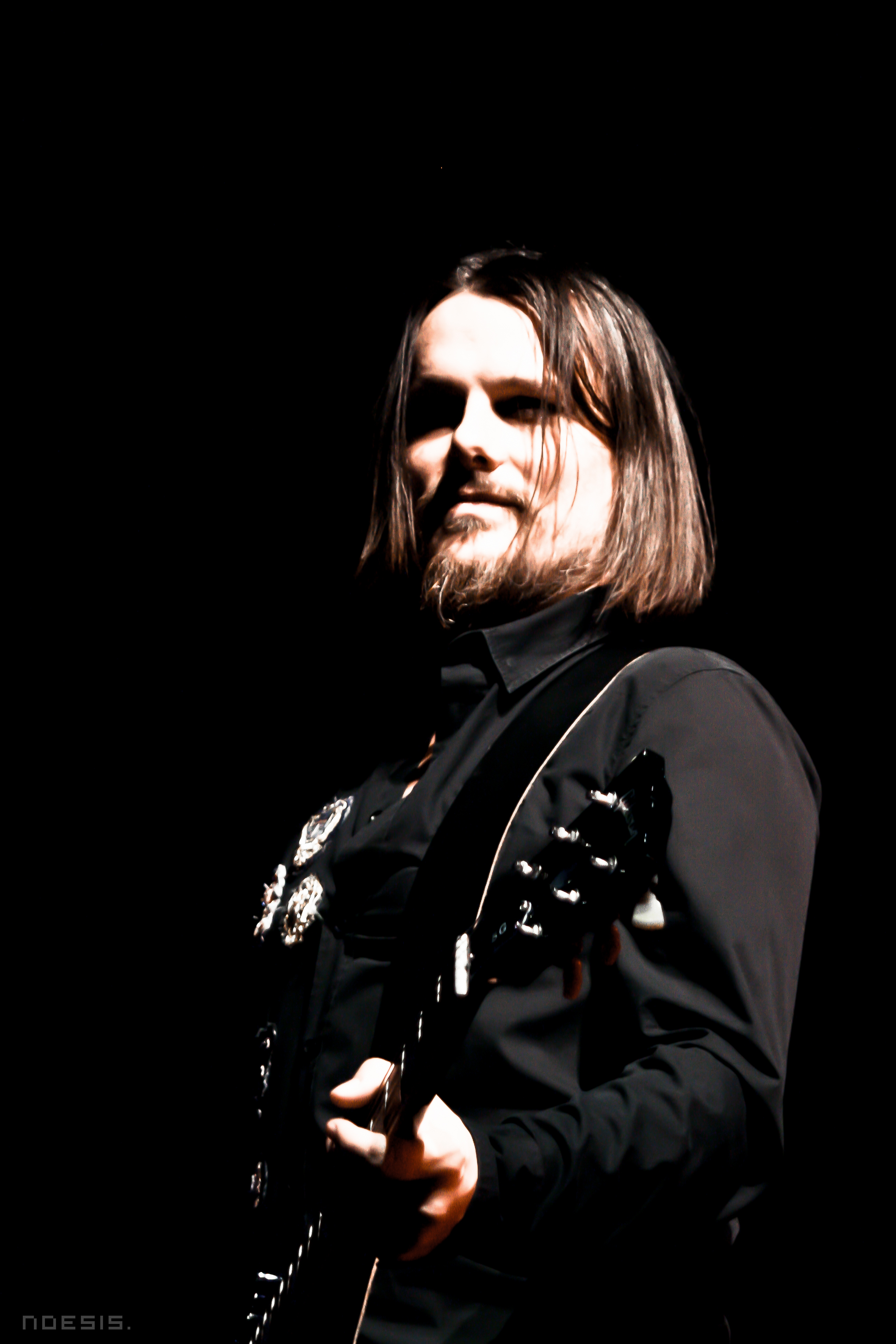 Olivier Gérard, tournée Indochine, Meteor Tour.